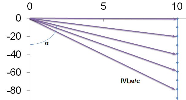 Изначальная скорость тела Vx= 10 м/с